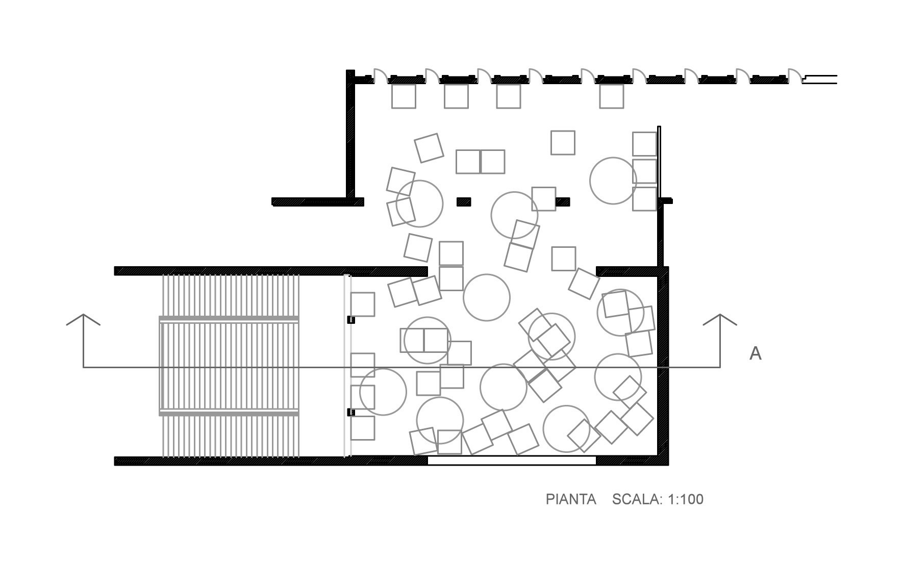 Pianta della mostra dell'industrial design presentata alla X edizione della Triennale di Milano